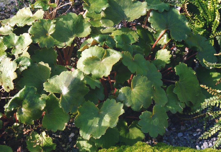 Saxifraga cortusifolia var. fortunei